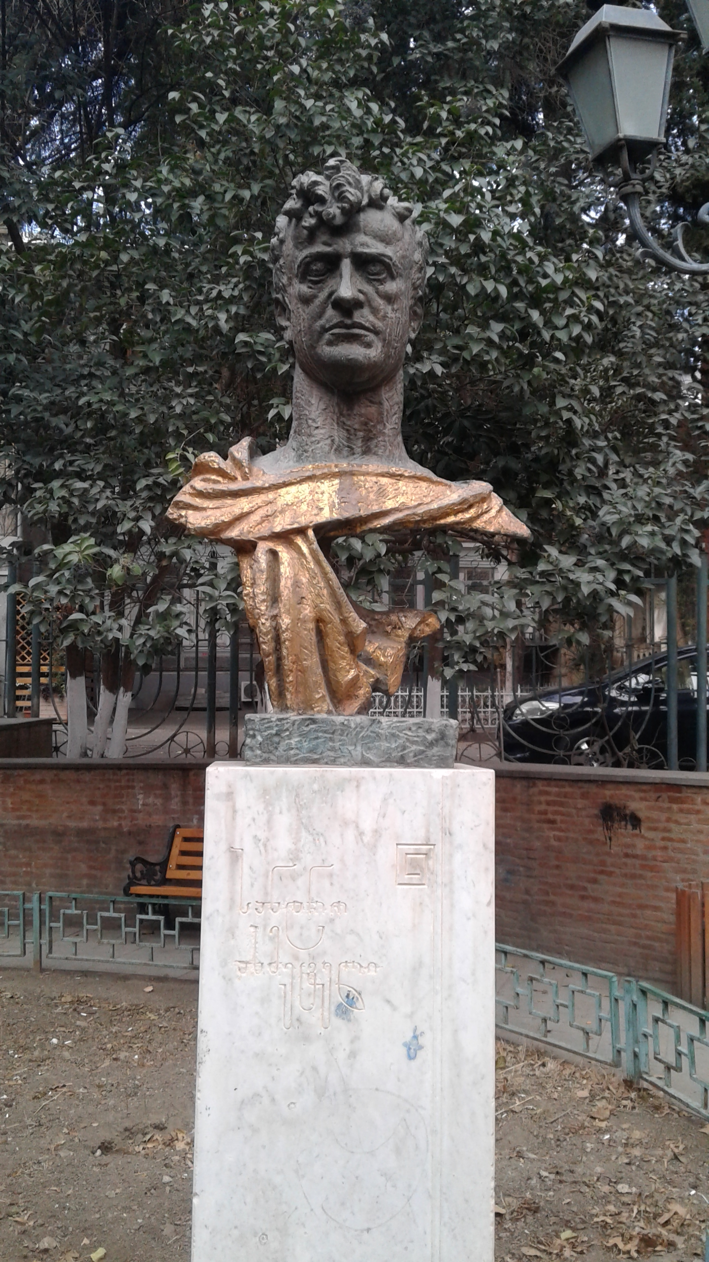 სანდრო ახმეტელის ძეგლი მაჩაბლის ქუჩაზე